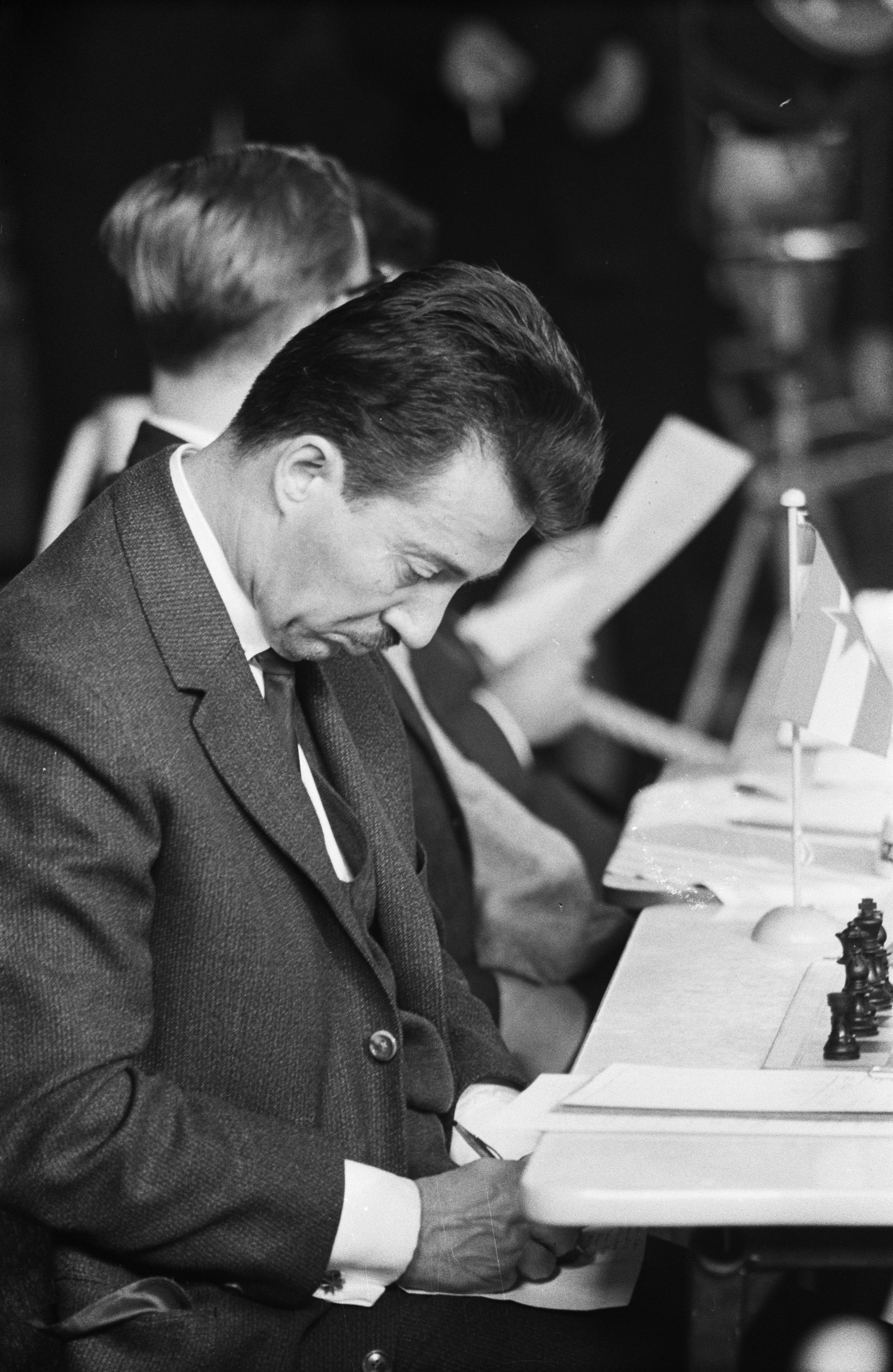 Collectie / Archief : Fotocollectie Anefo Reportage / Serie : [ onbekend ] Beschrijving : Fide schaaktoernooi. S. Gligoric Datum : 4 oktober 1963 Trefwoorden : SCHAAKTOURNOOIEN Persoonsnaam : Gligoric, S. Fotograaf : Pot, Harry / Anefo Auteursrechthebbende : Nationaal Archief Materiaalsoort : Negatief (zwart/wit) Nummer archiefinventaris : bekijk toegang 2.24.01.05 Bestanddeelnummer : 915-5981